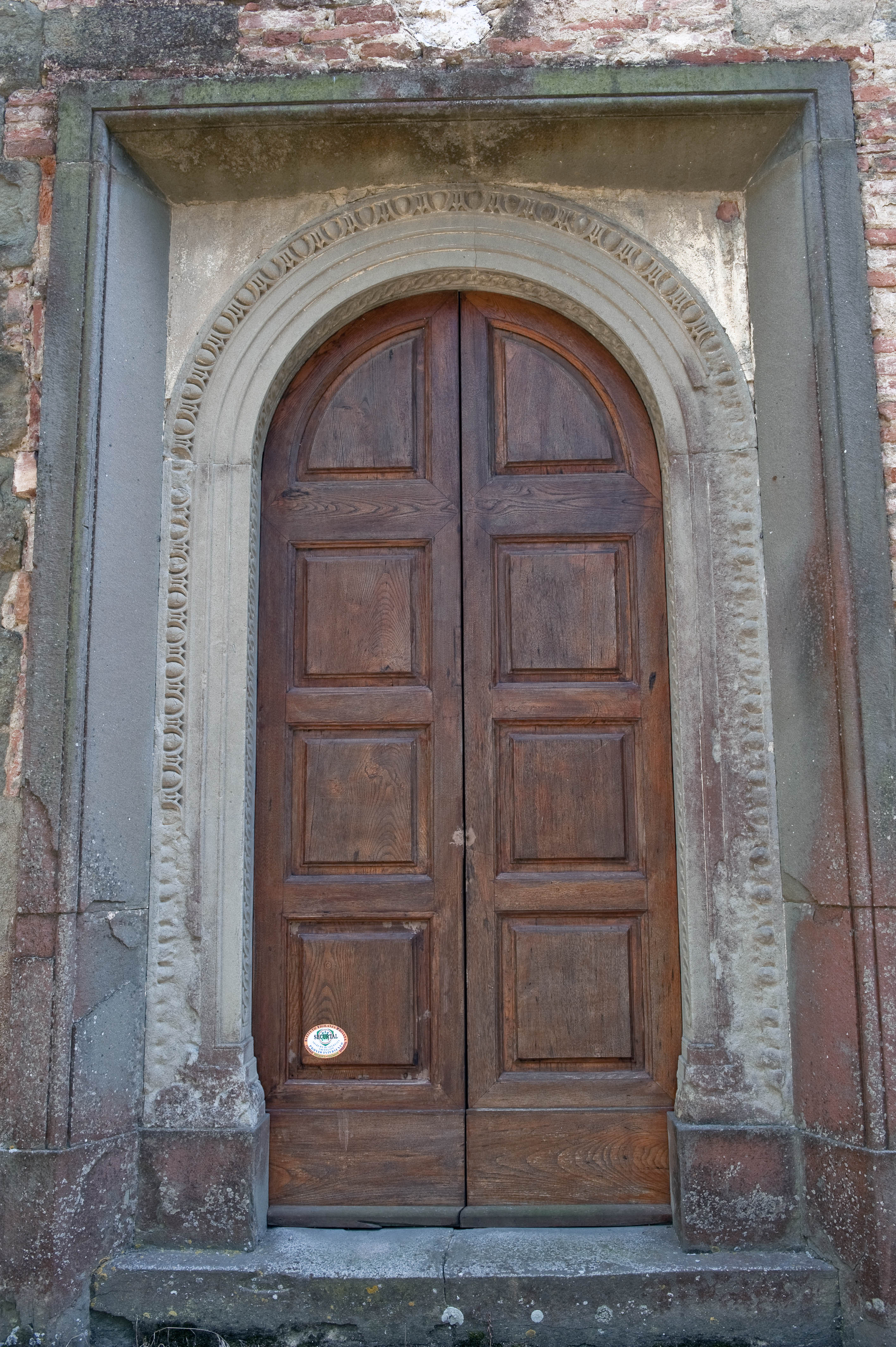 Portale di accesso alla chiesa di San Michele arcangelo a Castiglioni, Montespertoli